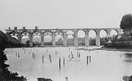 Le viaduc ferroviaire de Kerhuon en construction (1862, photo prise par Alfred Bernier)